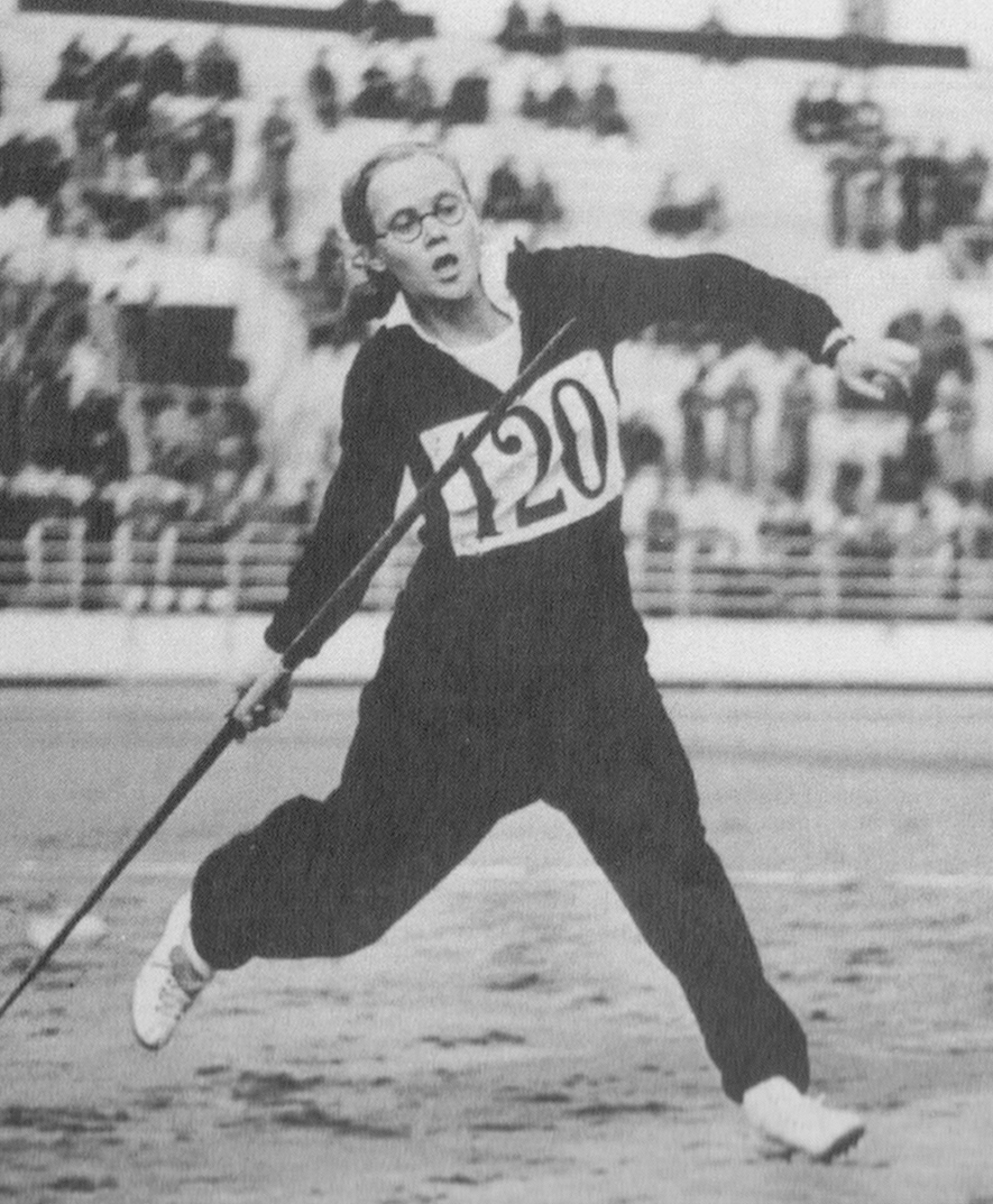 Kaisa Parviainen